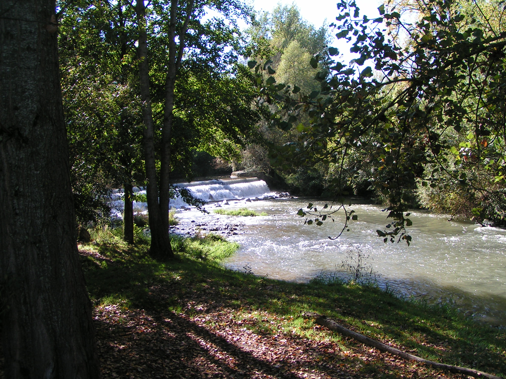 La Louge à Peyssies Catégorie: Image GFDL